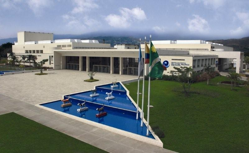 Fachada del Centro de Eventos Valle del Pacifico Cali - Colombia